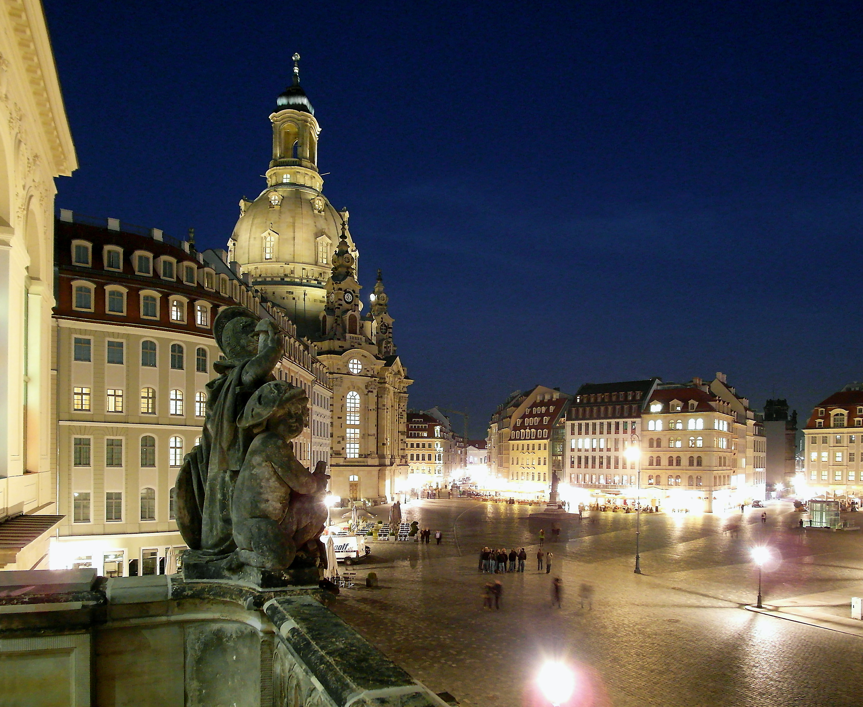 18.10.2012 01067 Dresden: Neumarkt mit Frauenkirche (51.051905,13.741545. [SAM2492.JPG]20121018630DR.JPG(c)Blobelt